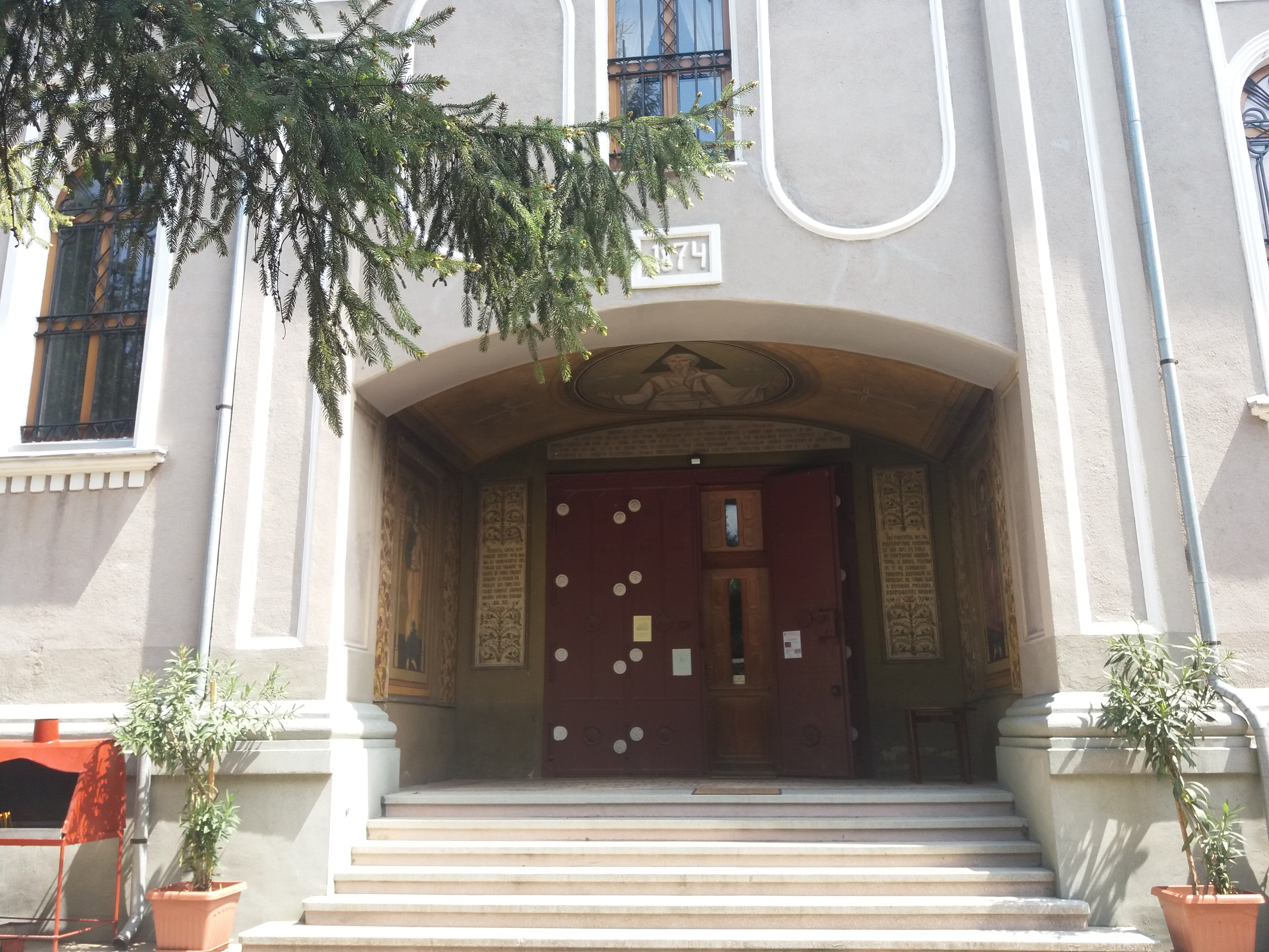 Biserica Izvorul Tămăduirii din Calafat Intrare